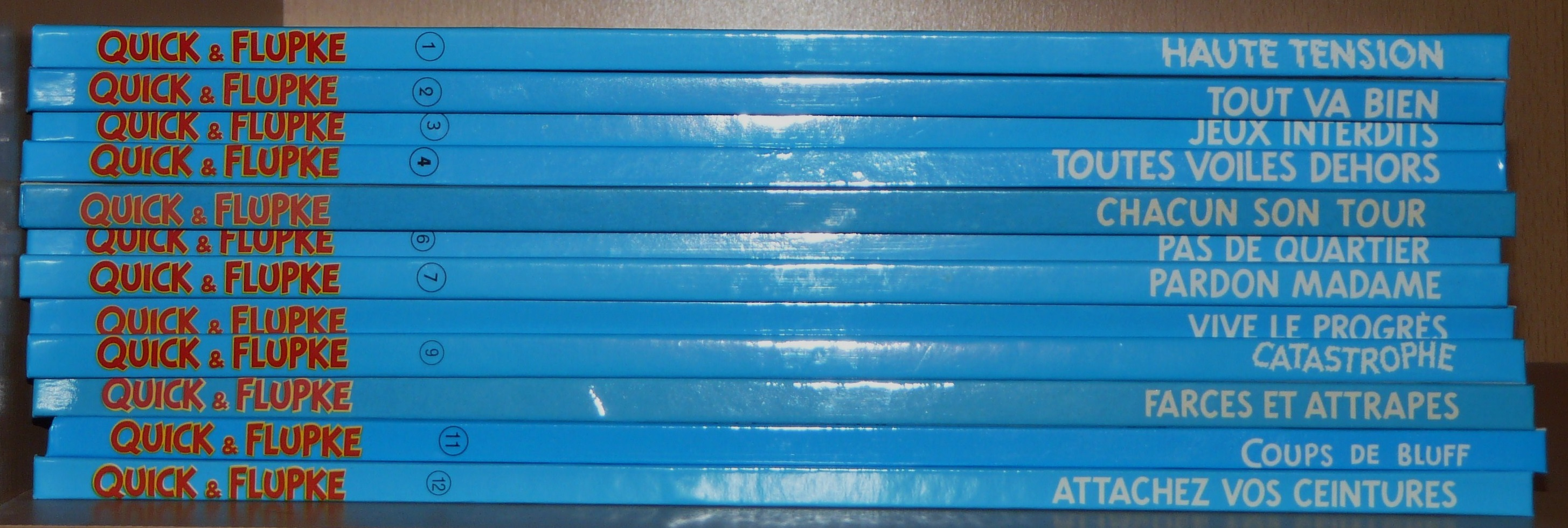 Les douze albums de la collection de bandes dessinées Quick et Flupke de Hergé.